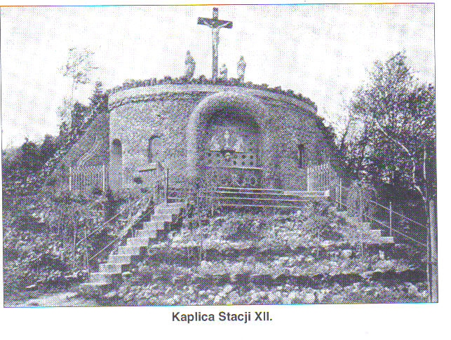 Stacja XII starej kalwarii ujskiej na pocztówce z roku ok. 1910.